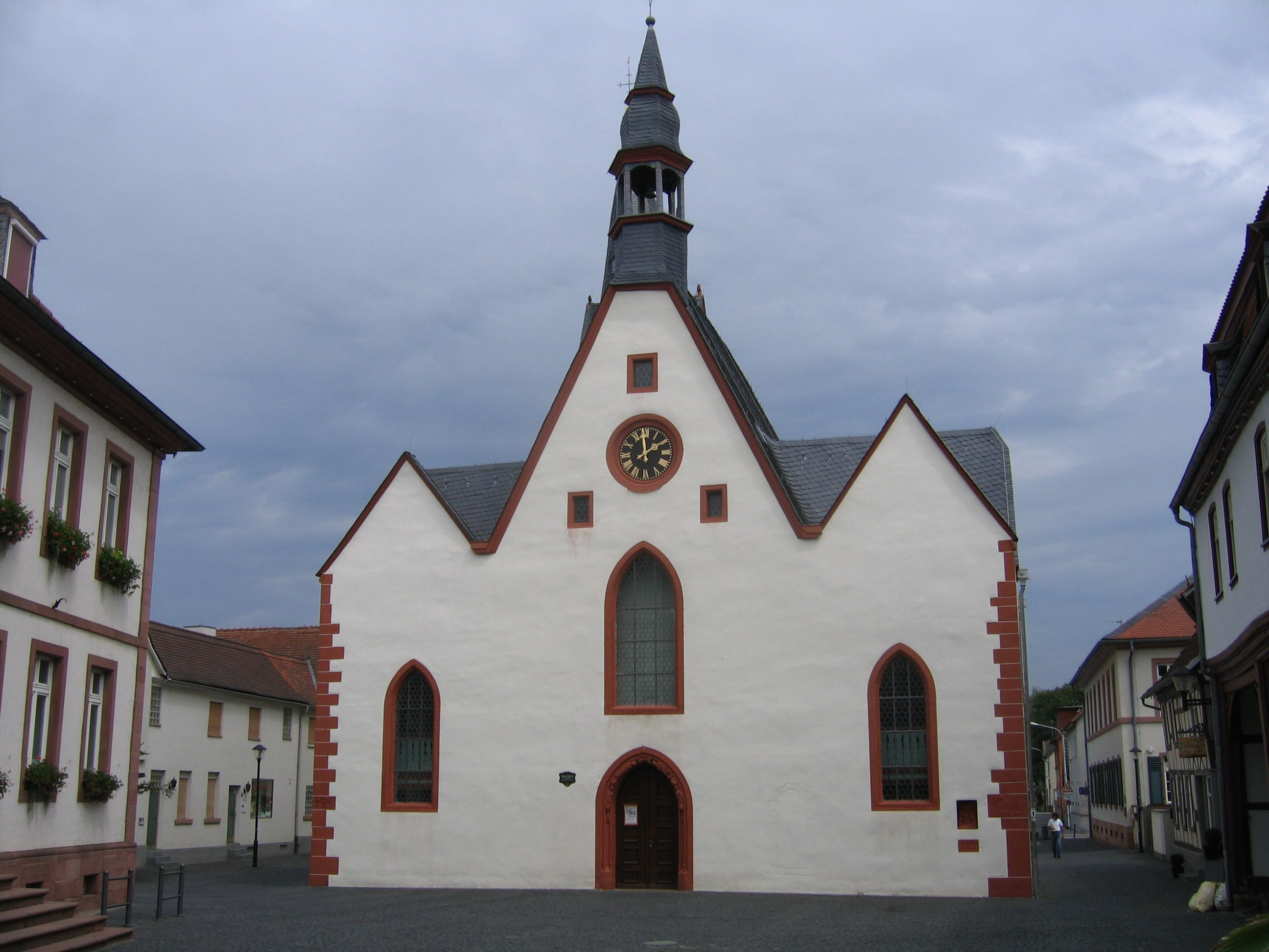 Stadtkirche Babenhausen1